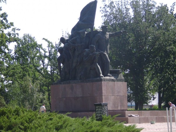 Памятник участникам Николаевского десанта на мемориале в г. Николаеве